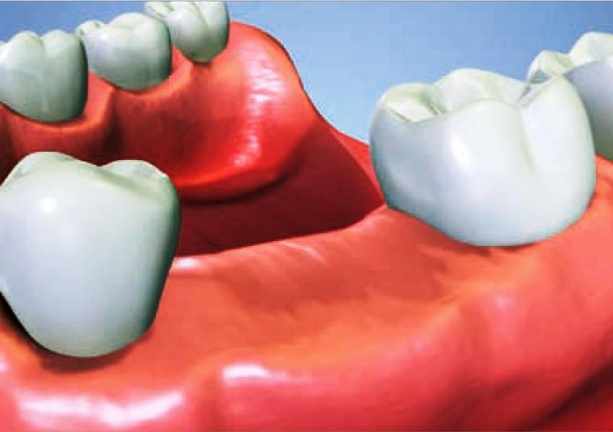 postup implantace1